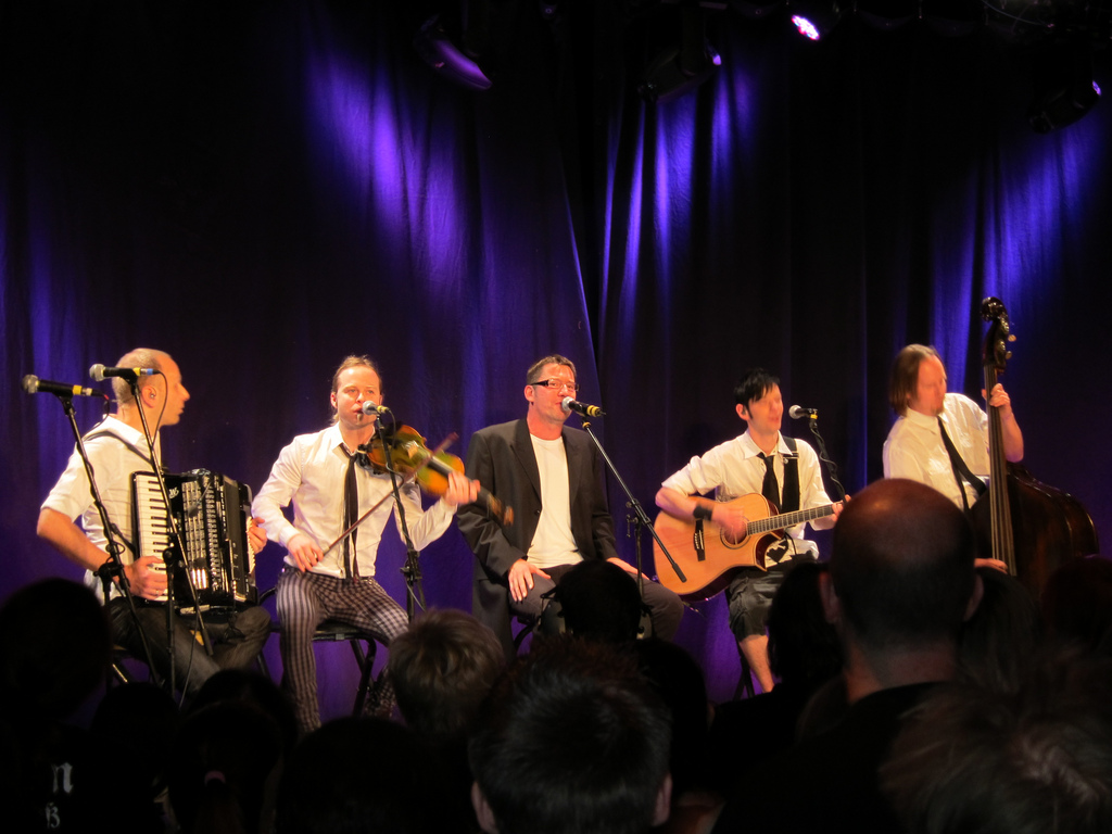 Fiddler's Green (band)